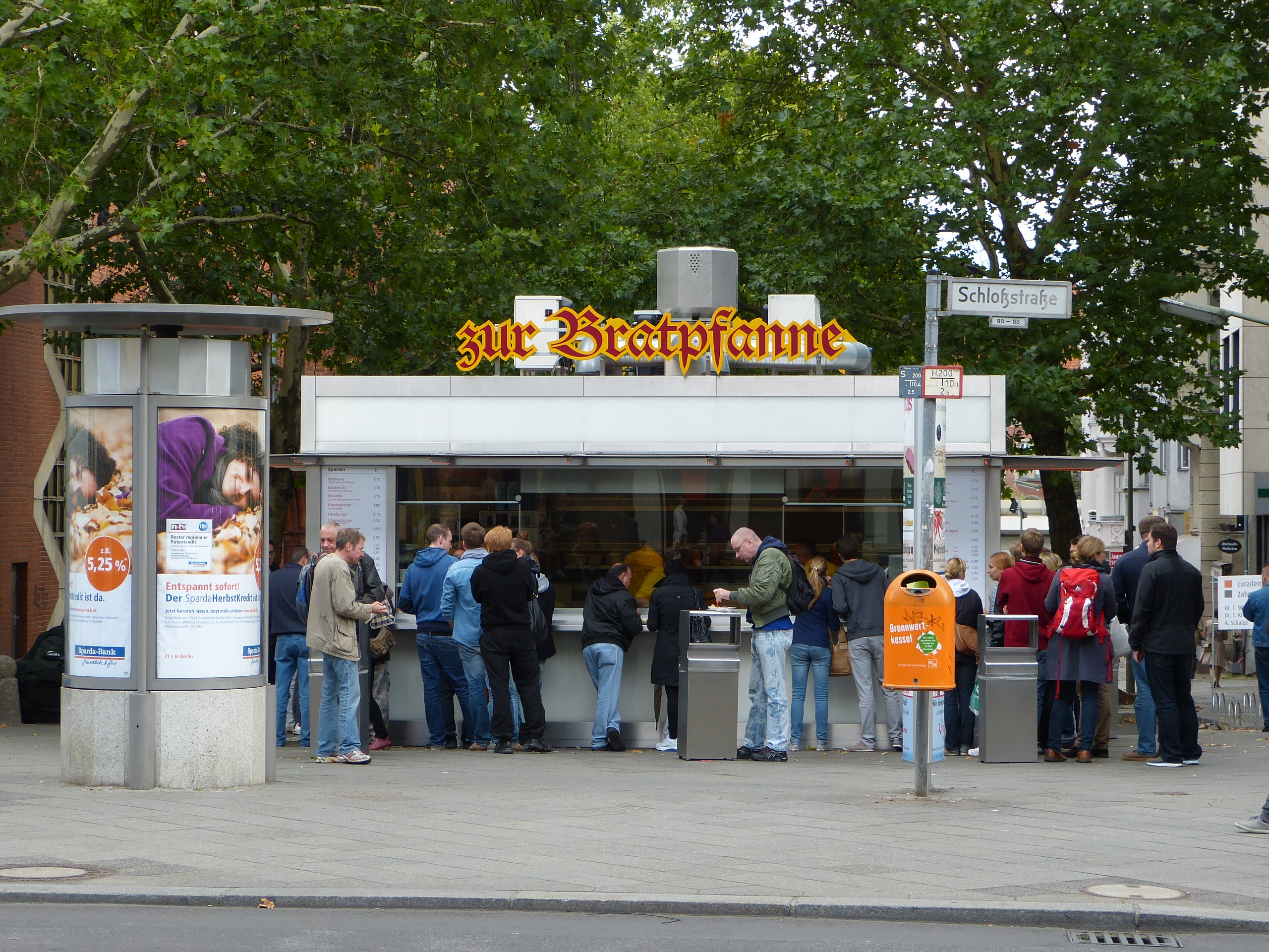 Berlin-Steglitz, Schloßstraße/Ecke Kieler Straße, Currywurst-Imbiss "Zur Bratpfanne"